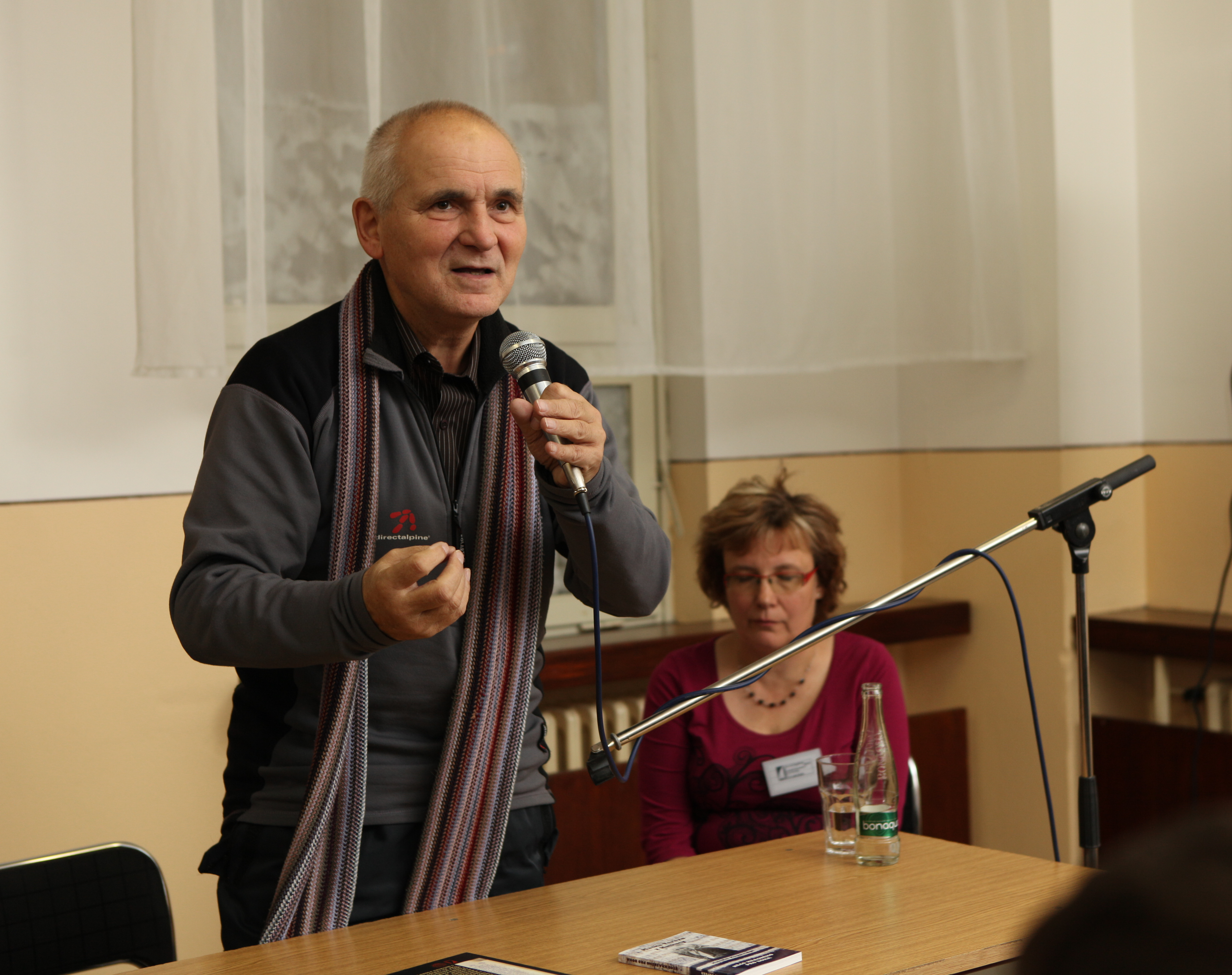 Spisovatel a kněž František Lízna na besedě na Podzimním knížním veletrhu v Havlíčkově Brodu